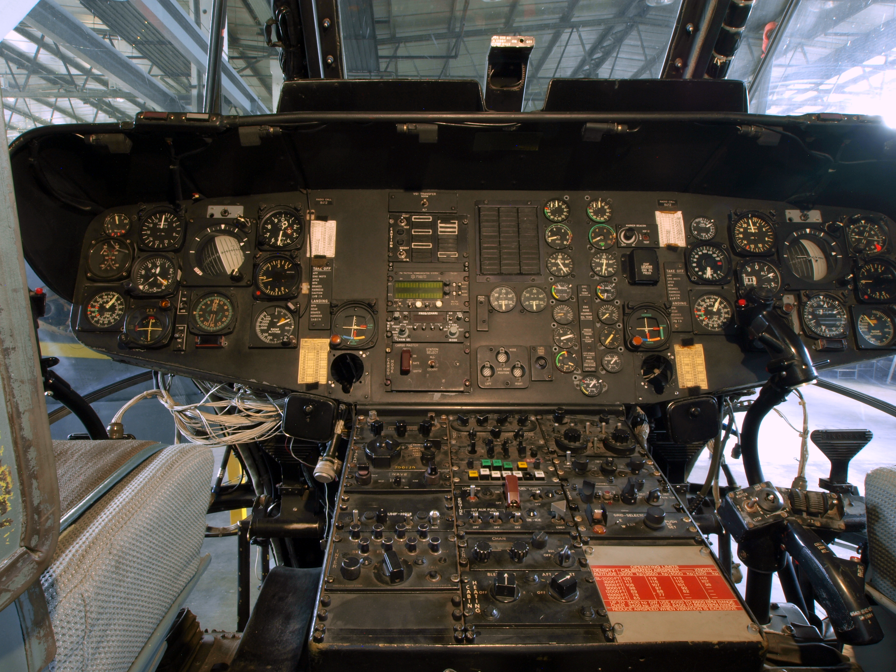 Sikorsky CH53 cockpit